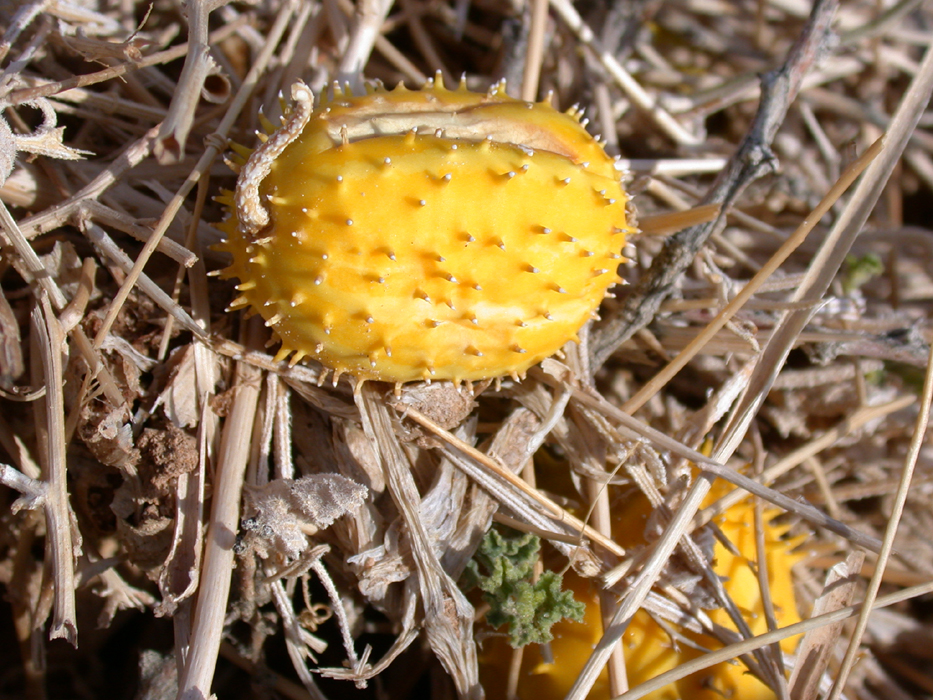 Cucumis prophetarum L. (מלפפון הנביאים, קישוא הנביאים), Northern Negev, Israel, December 29, 2006.